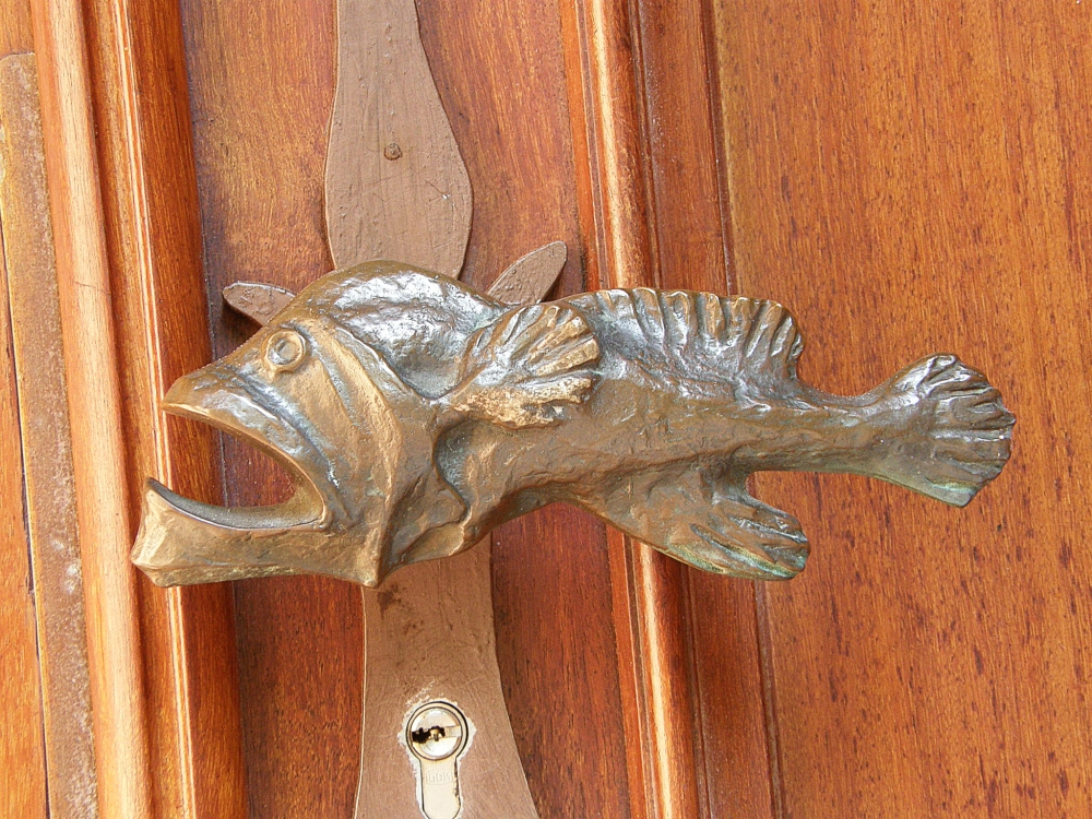 Die Tür am Eingang